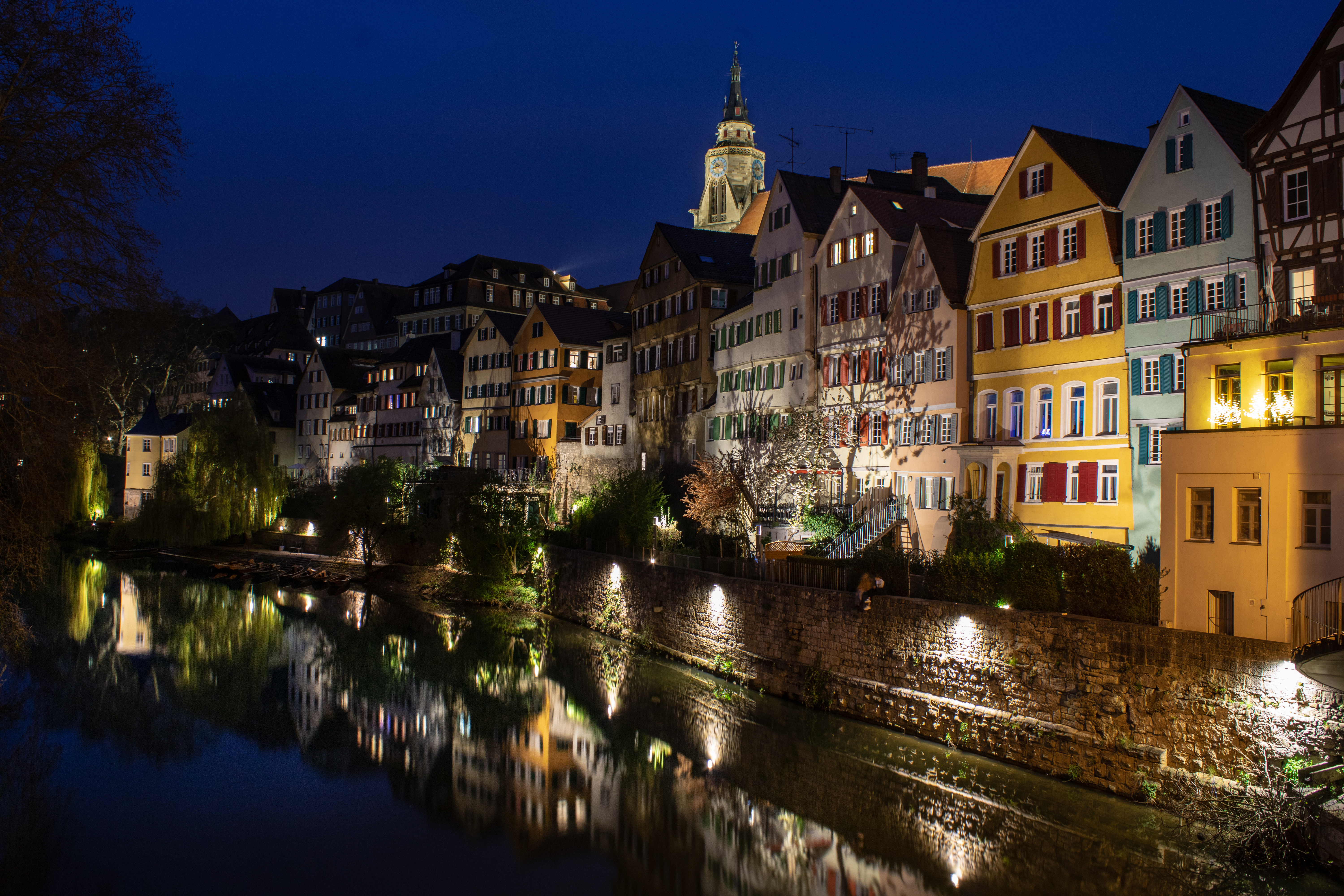 Rive du Neckar à Tübingen à l'heure bleue 2019